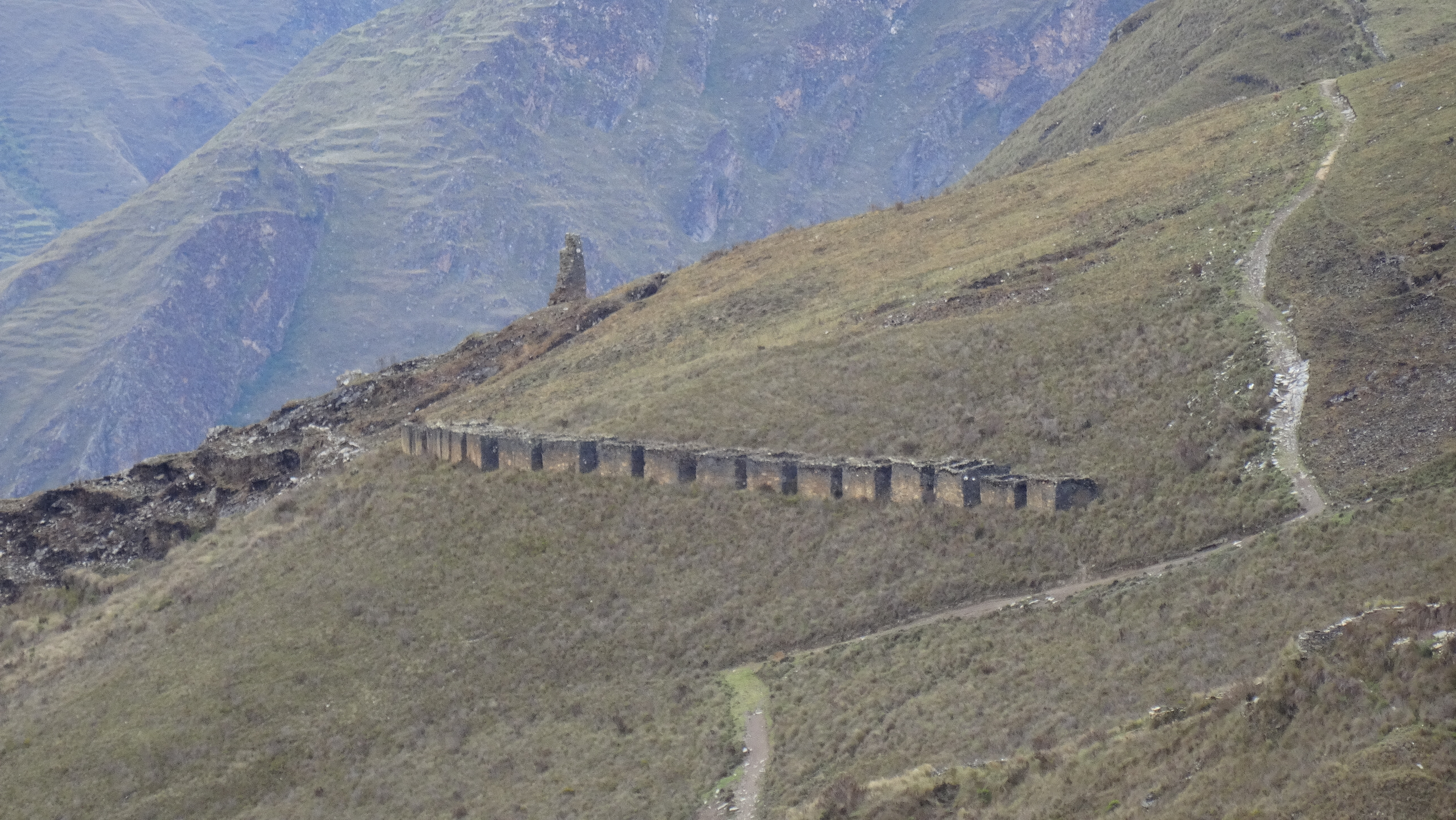 El tren de graneros o colcas visto desde la trocha que va de Carpa hacia Tantamayo.